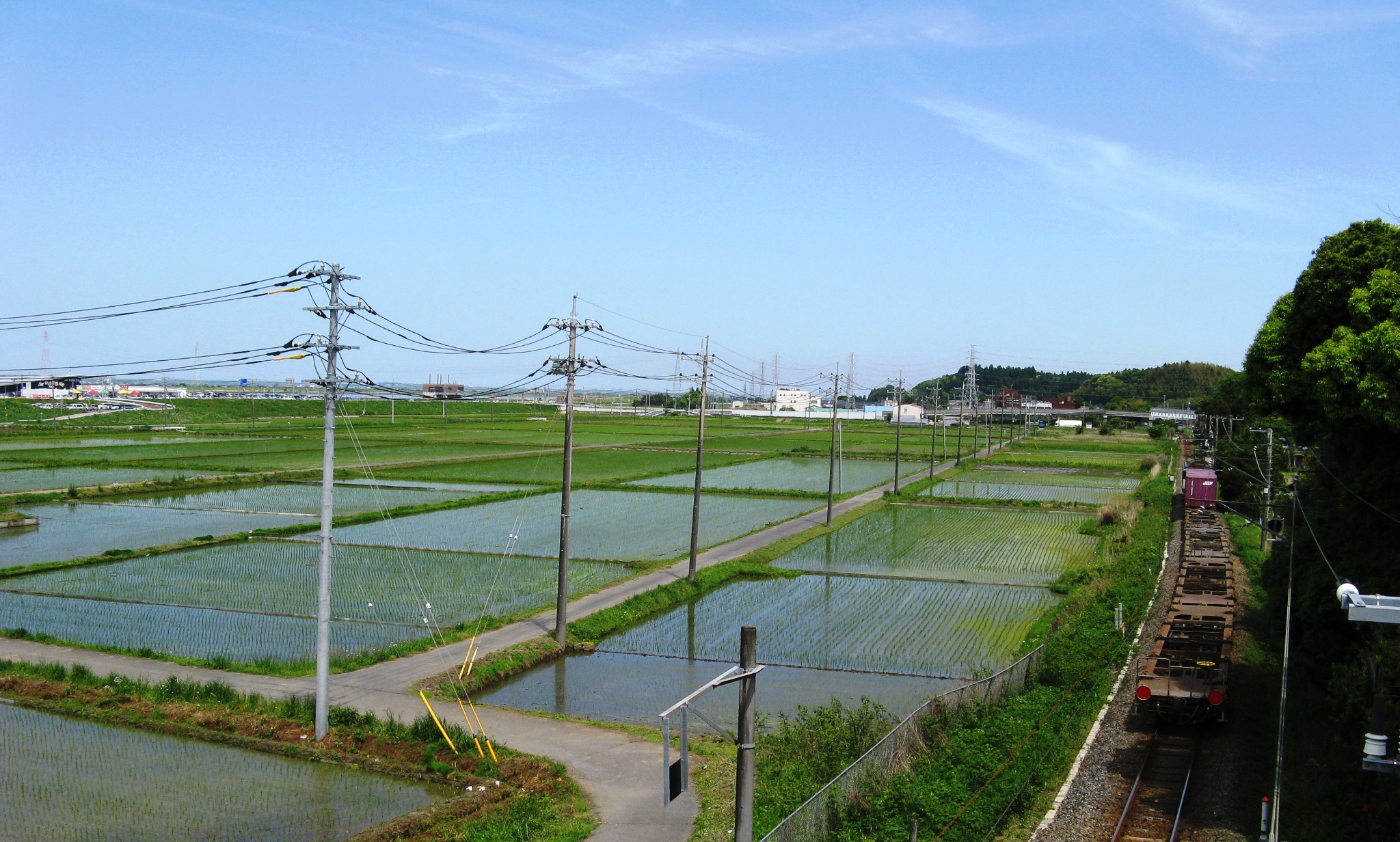 千葉県香取市本宿耕地地区、水の郷さわら、JR成田線、貨物列車 Canon PowerShot A720 IS